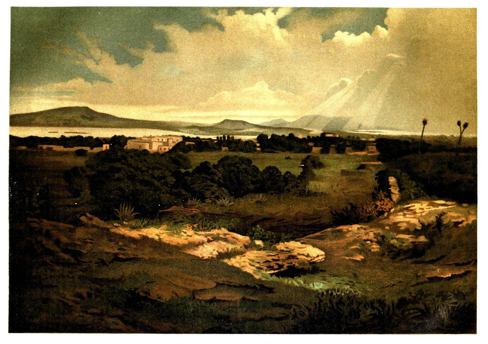 Imagen extraida del libro de Vicente Riva Palacio, Julio Zárate (1880) "México a través de los siglos" Tomo III: "La guerra de independencia" (1808 - 1821)